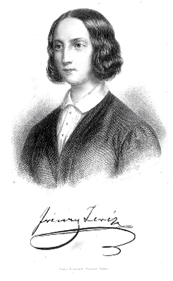 Ferenczy Teréz (1823–1853) írónő portréja